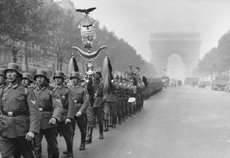 Bis zuletzt zog die Wachtparade mit klingendem Spiel über den Champs-Elysees in Paris. Im Hintergrund der Triumphbogen.